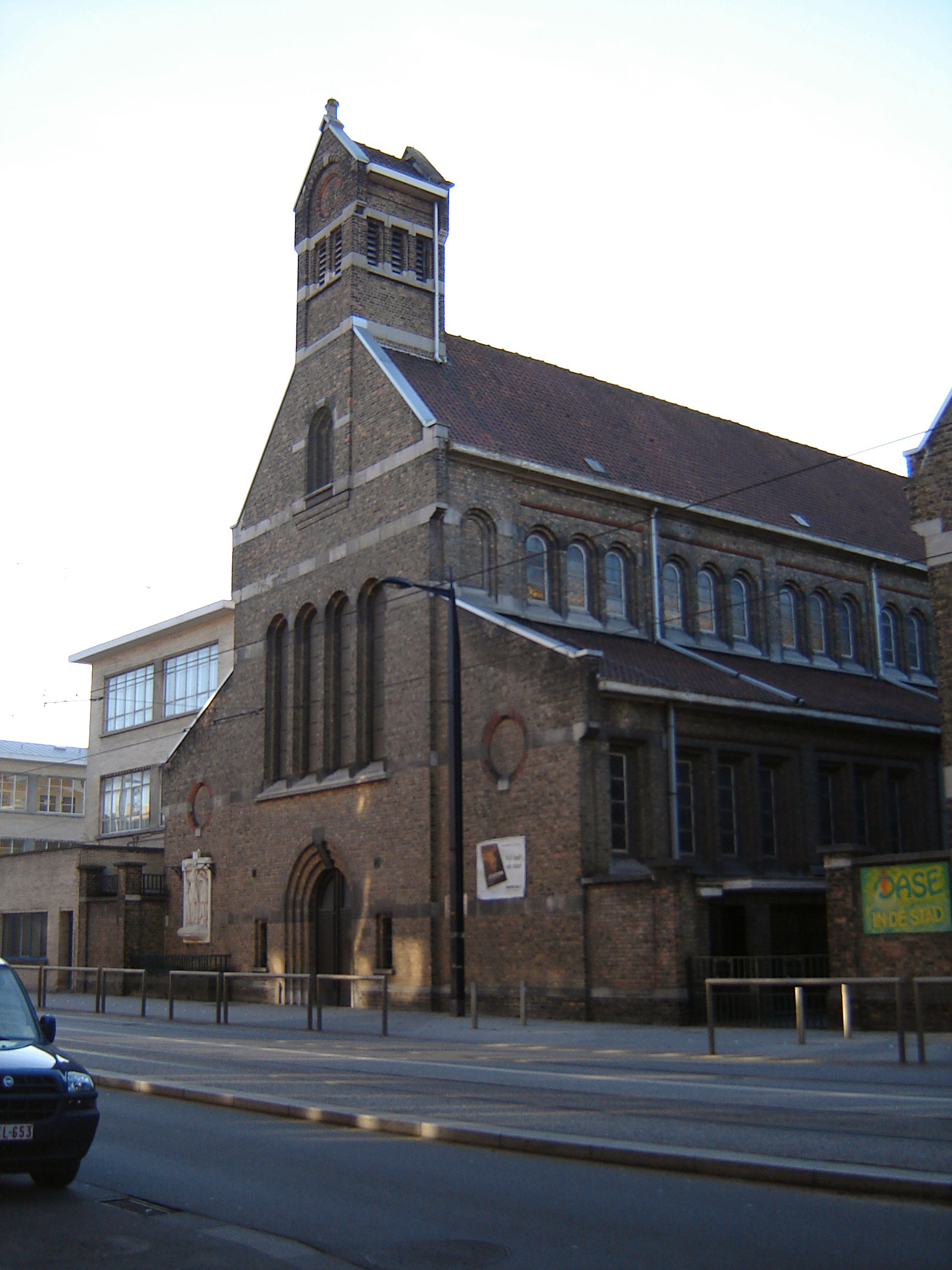 Kerk van de Redemptoristen aan de Voskenslaan in Gent. Redemptorists church at the Voskenslaan street in Gent. Gent, East Flanders, Belgium